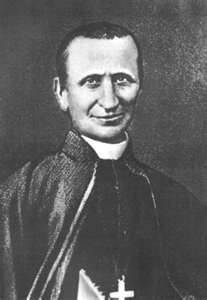 Premier èvêque du Gabon, Spiritain